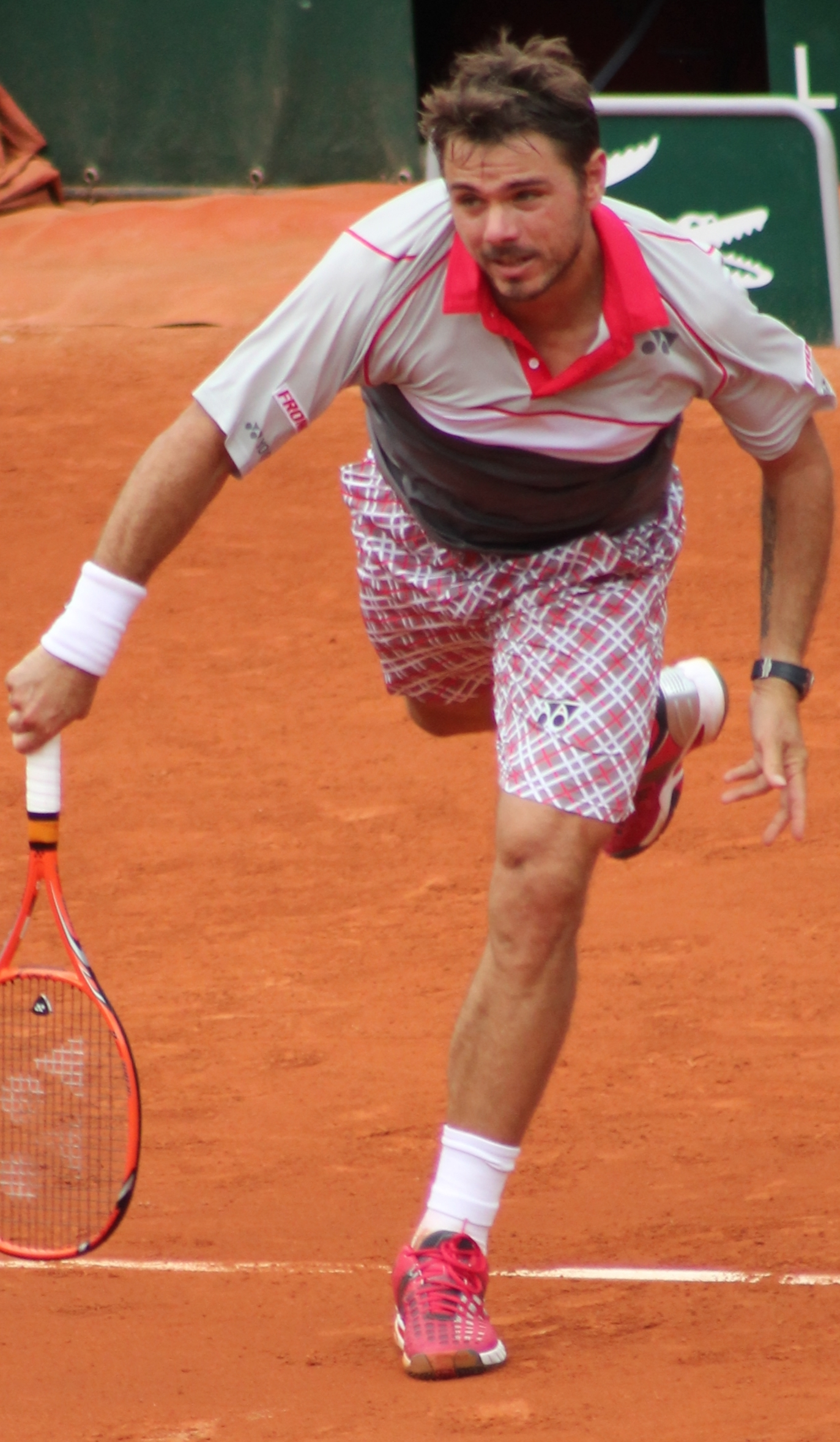 Wawrinka RG15 (15)